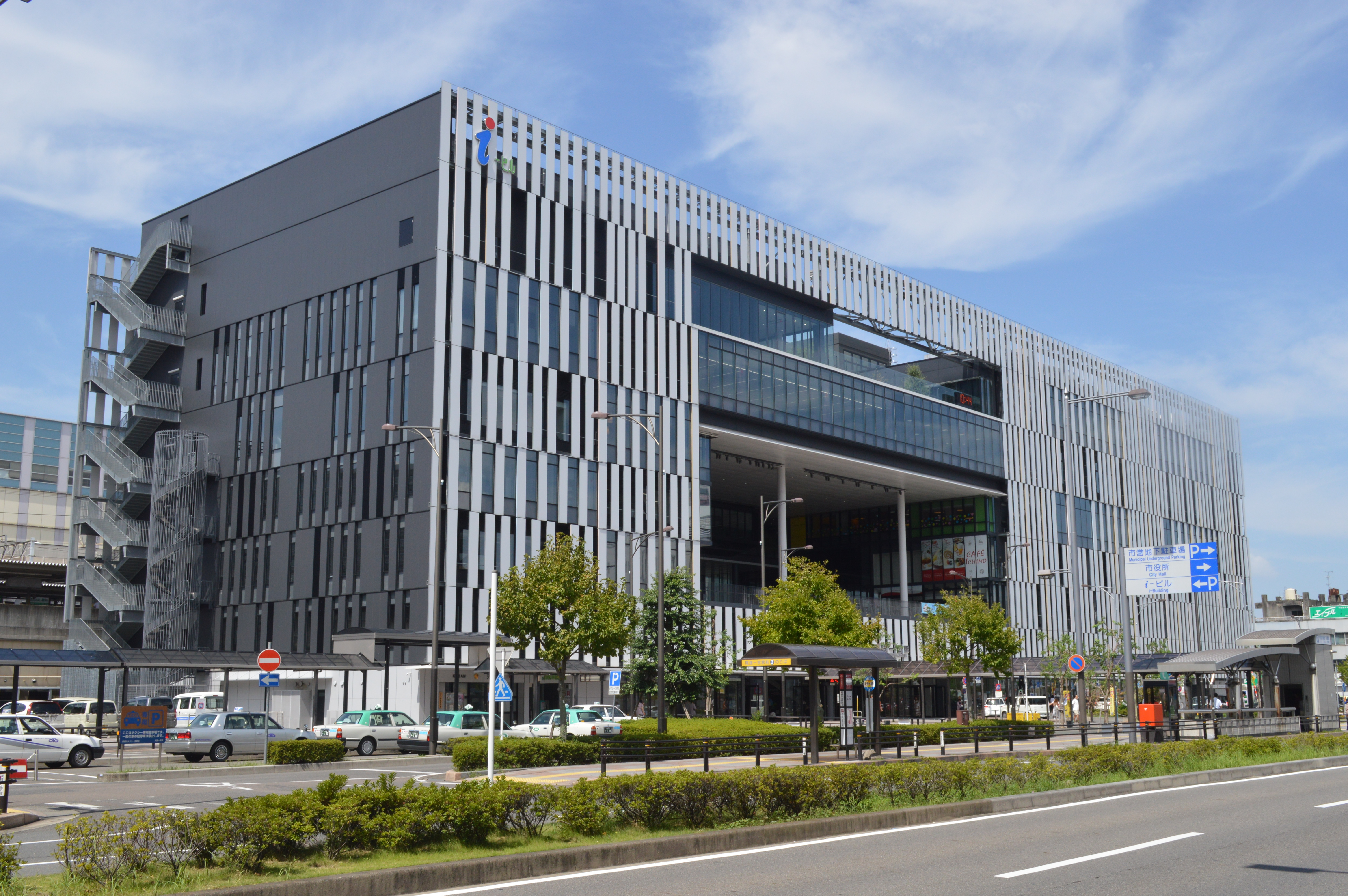 尾張一宮駅前ビル（i-ビル） 一宮市立中央図書館などを内包